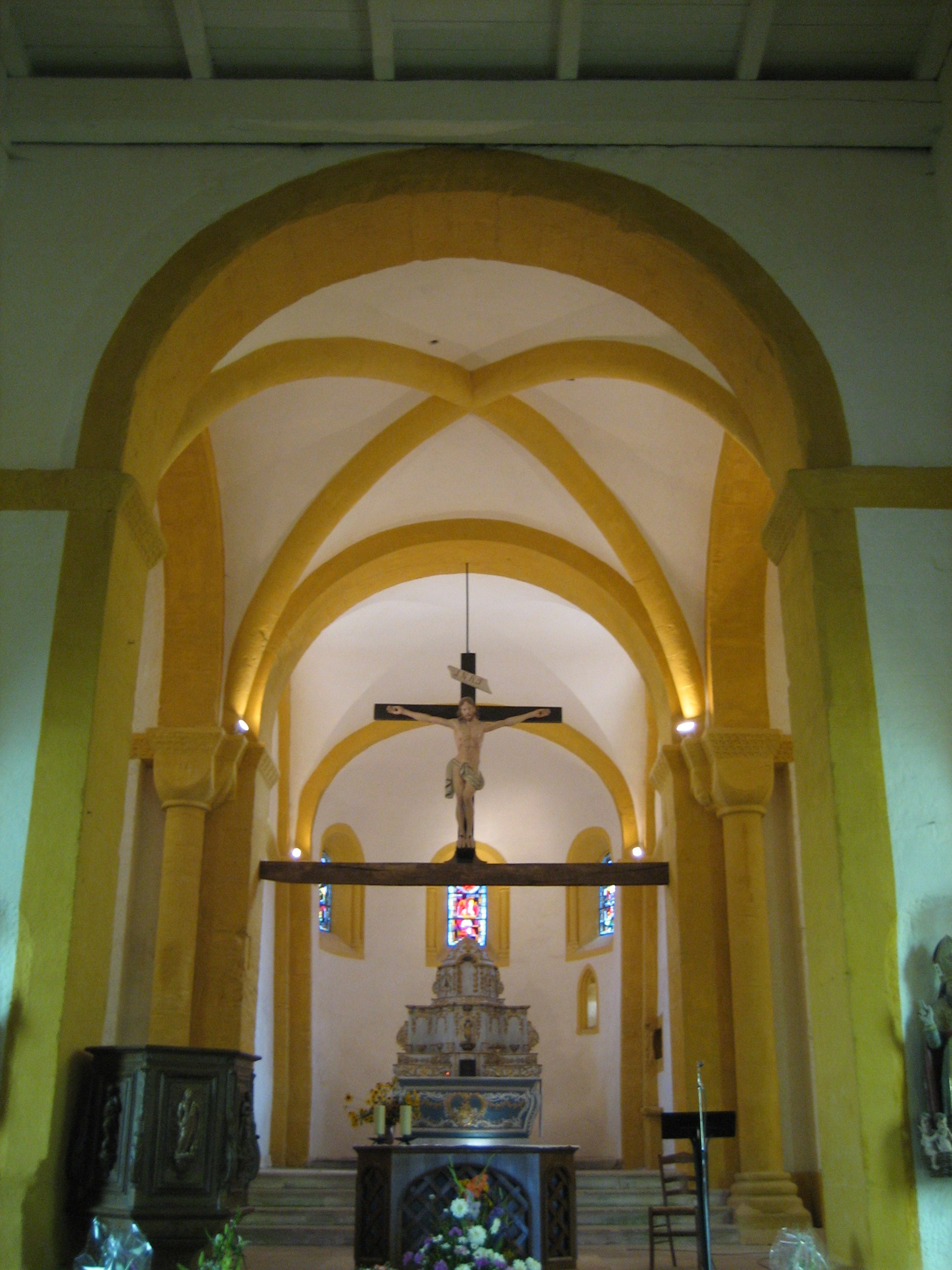 Chœur de Notre-Dame de Champ-le-Duc. Poutre de gloire. Autel et tabernacle du XVIIIe siècle classés monument historique.